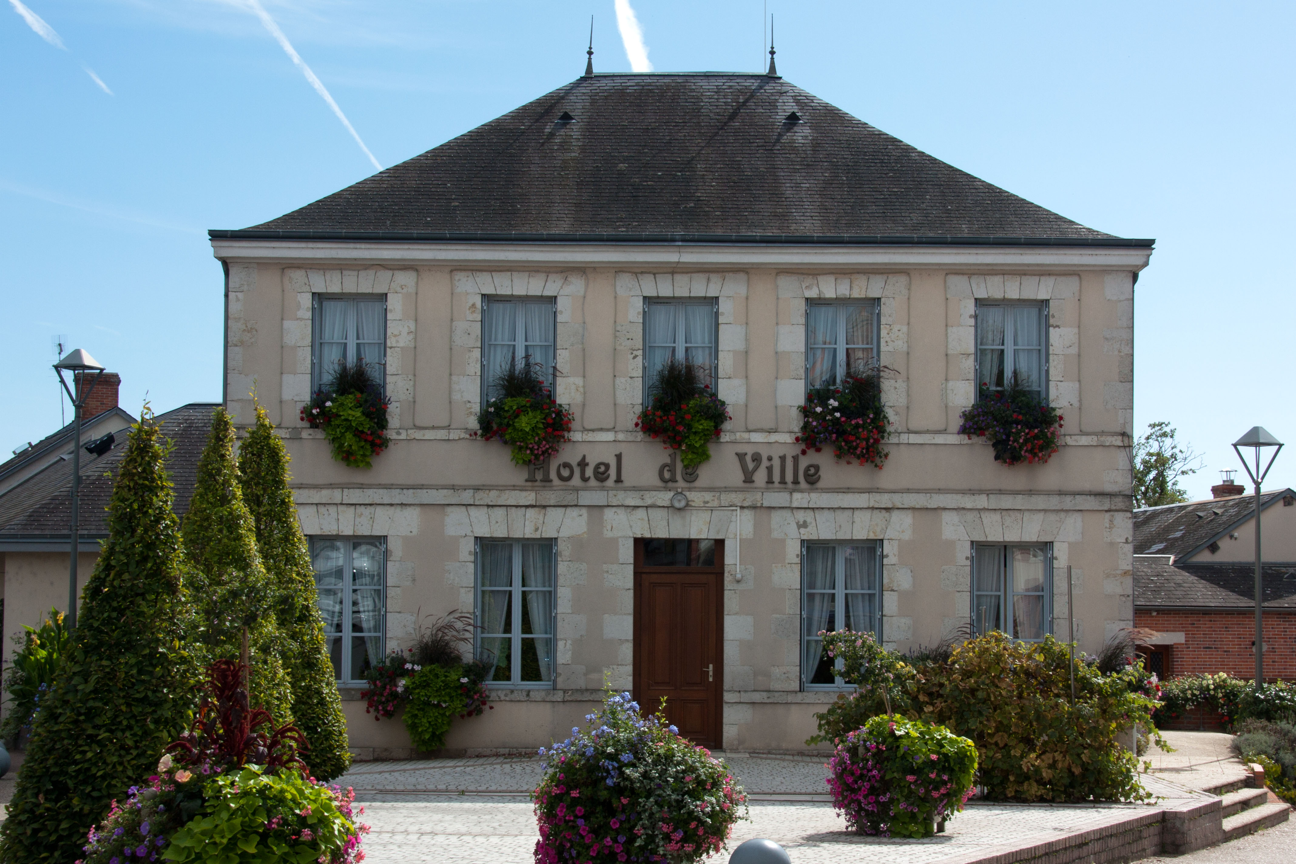 Mairie de Coullons, Coullons, Loiret, France